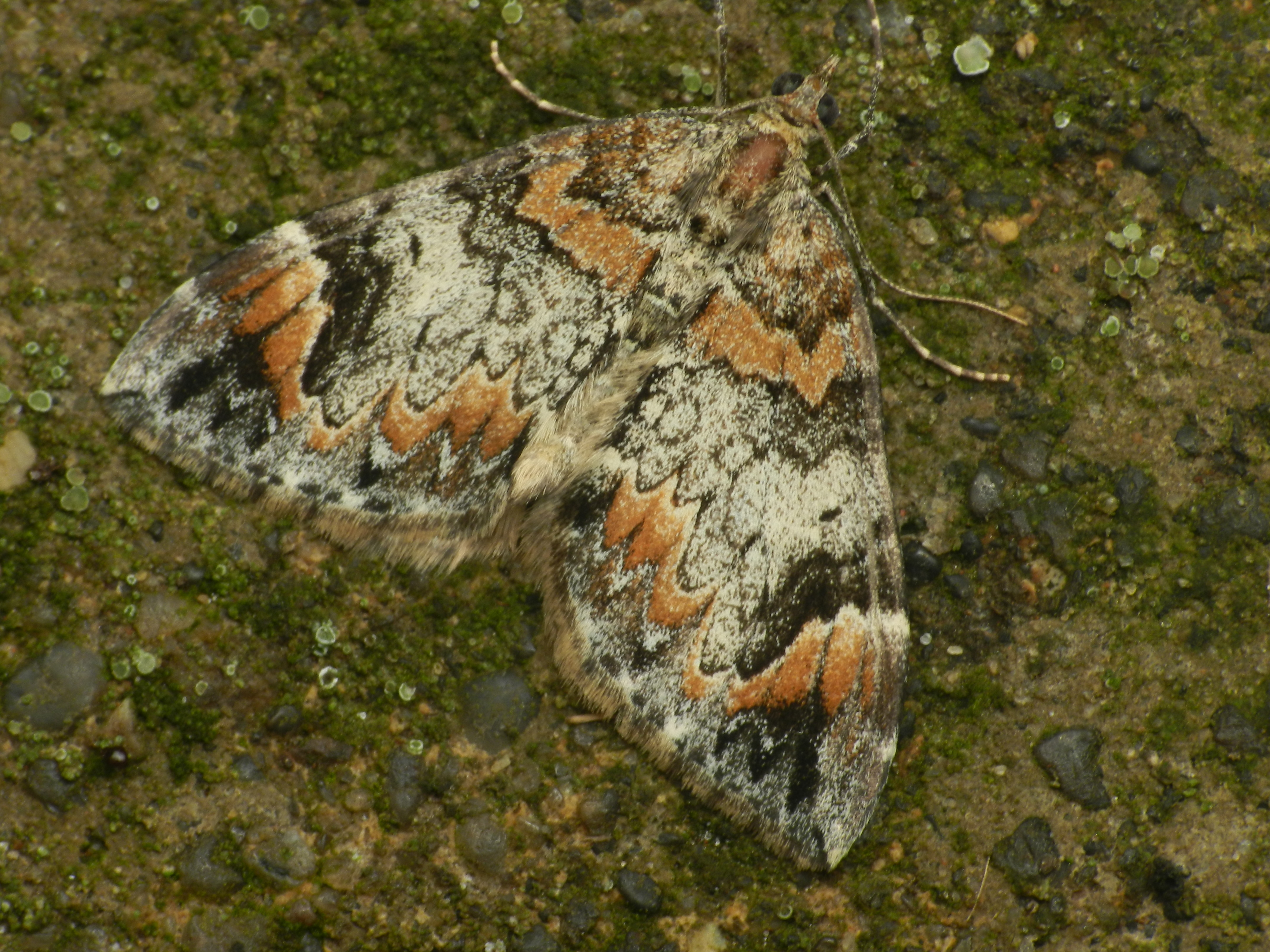 Dysstroma citrata. Picture taken in Olsztyn, Poland.